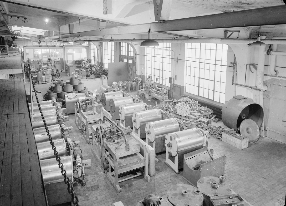 Produksjonslokale ved Thunes mekaniske verksted, 1947